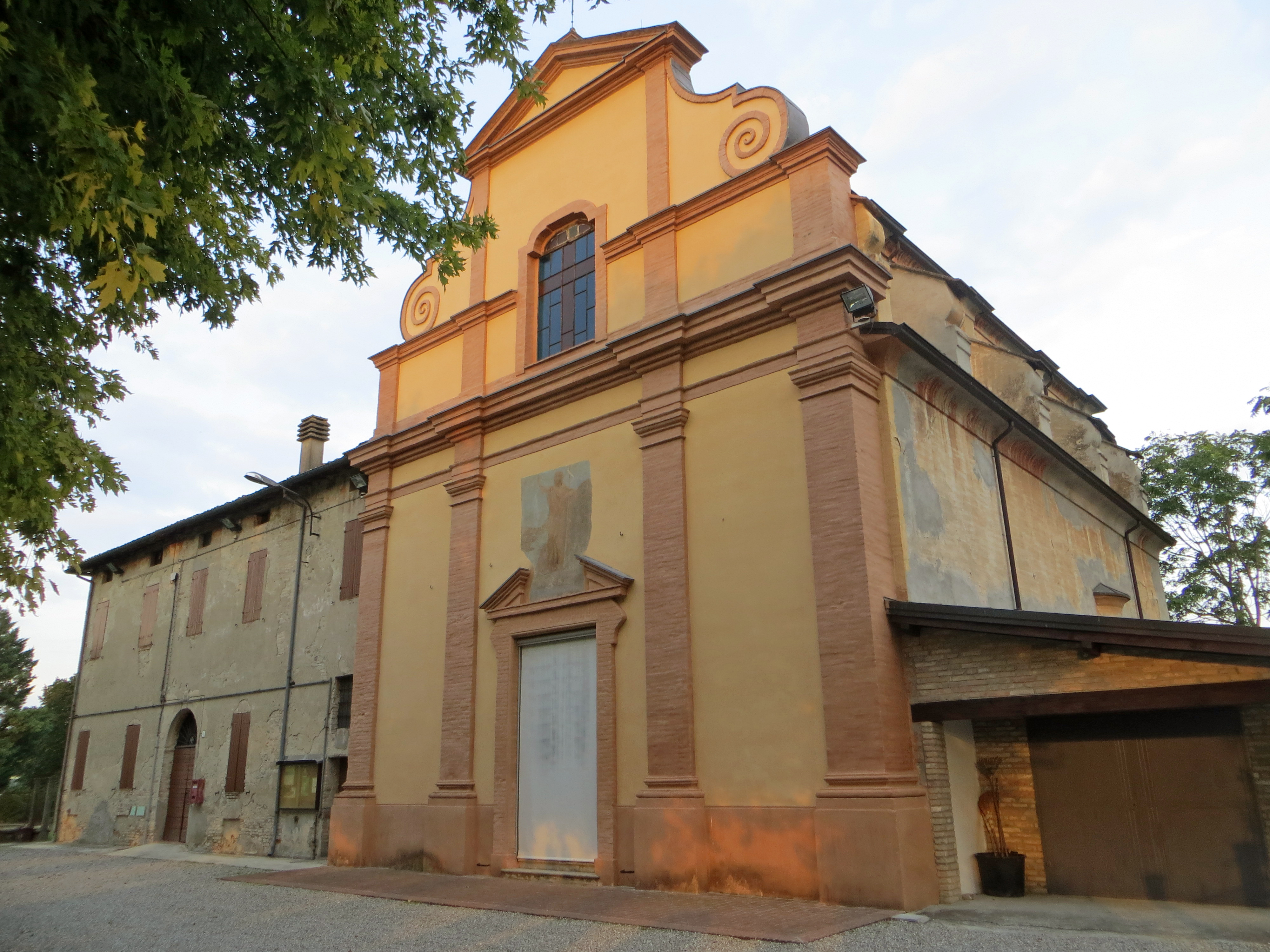 Chiesa dei Santi Giovanni Battista e Lorenzo (Bianconese, Fontevivo) - facciata e lato sud